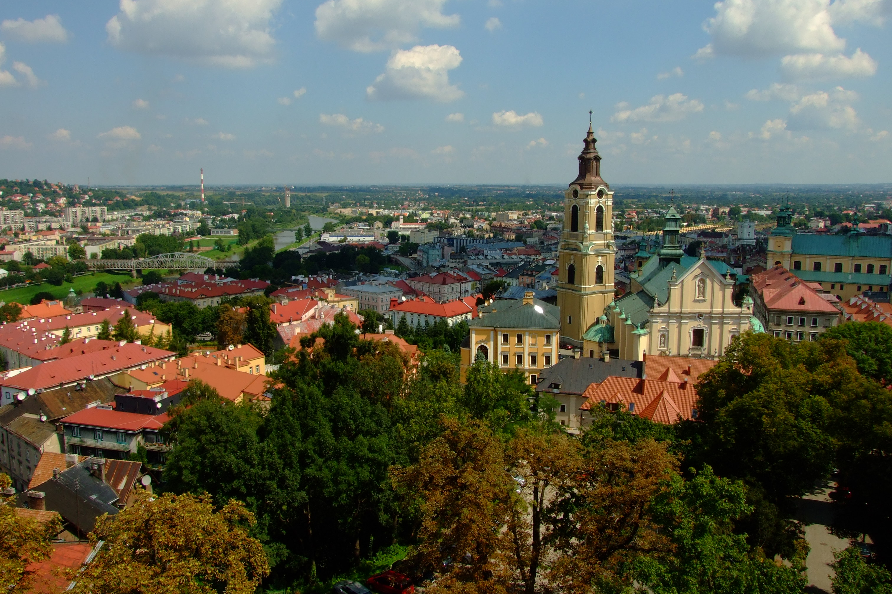 Przemyśl - Bazylika archikatedralna p.w. Wniebowzięcia NMP